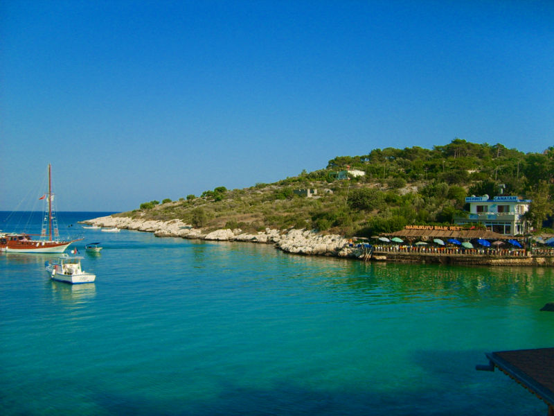 Narlikuyu